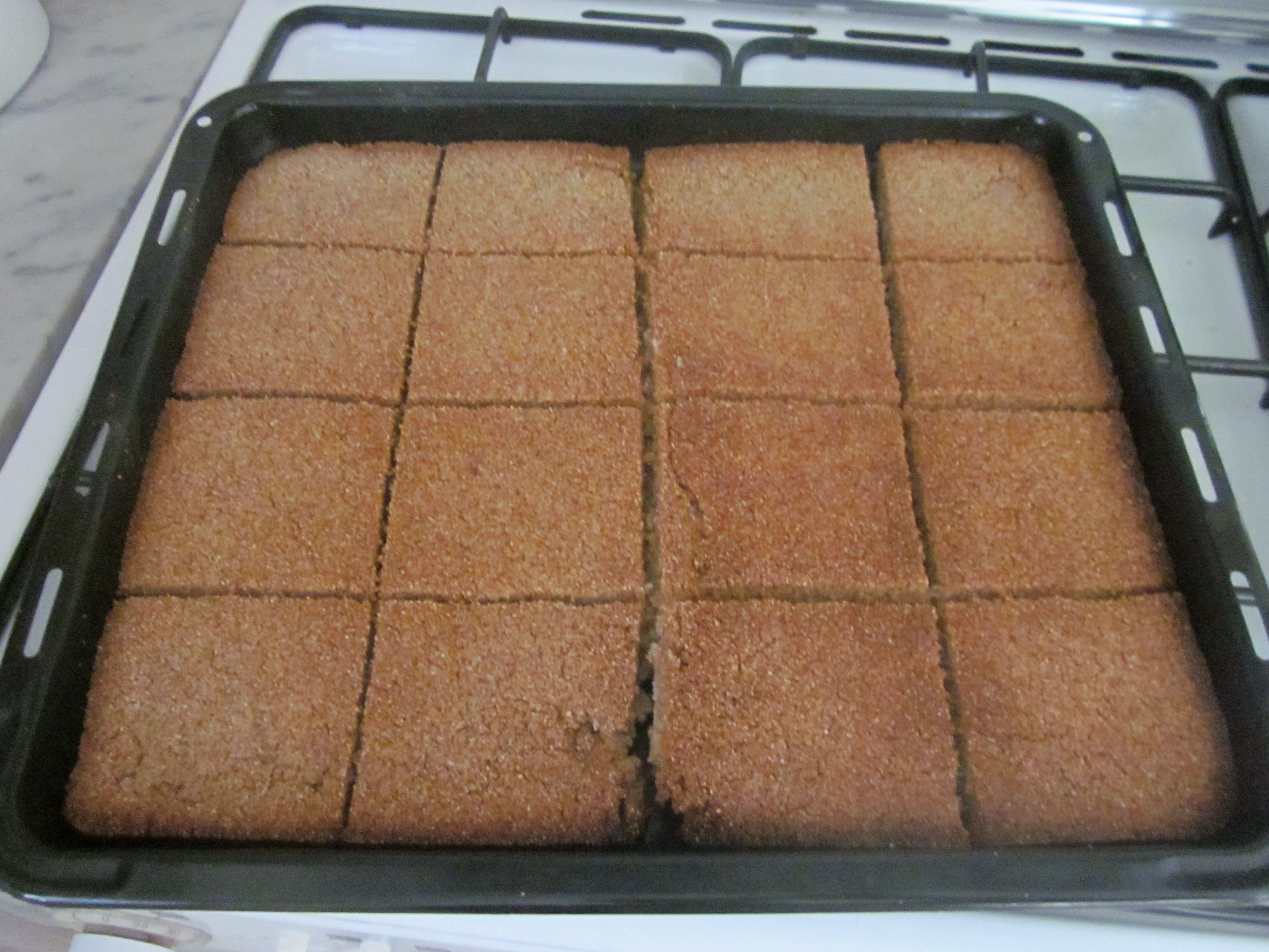 يتم إعداده لأكله في المرقة بخبز الشعير